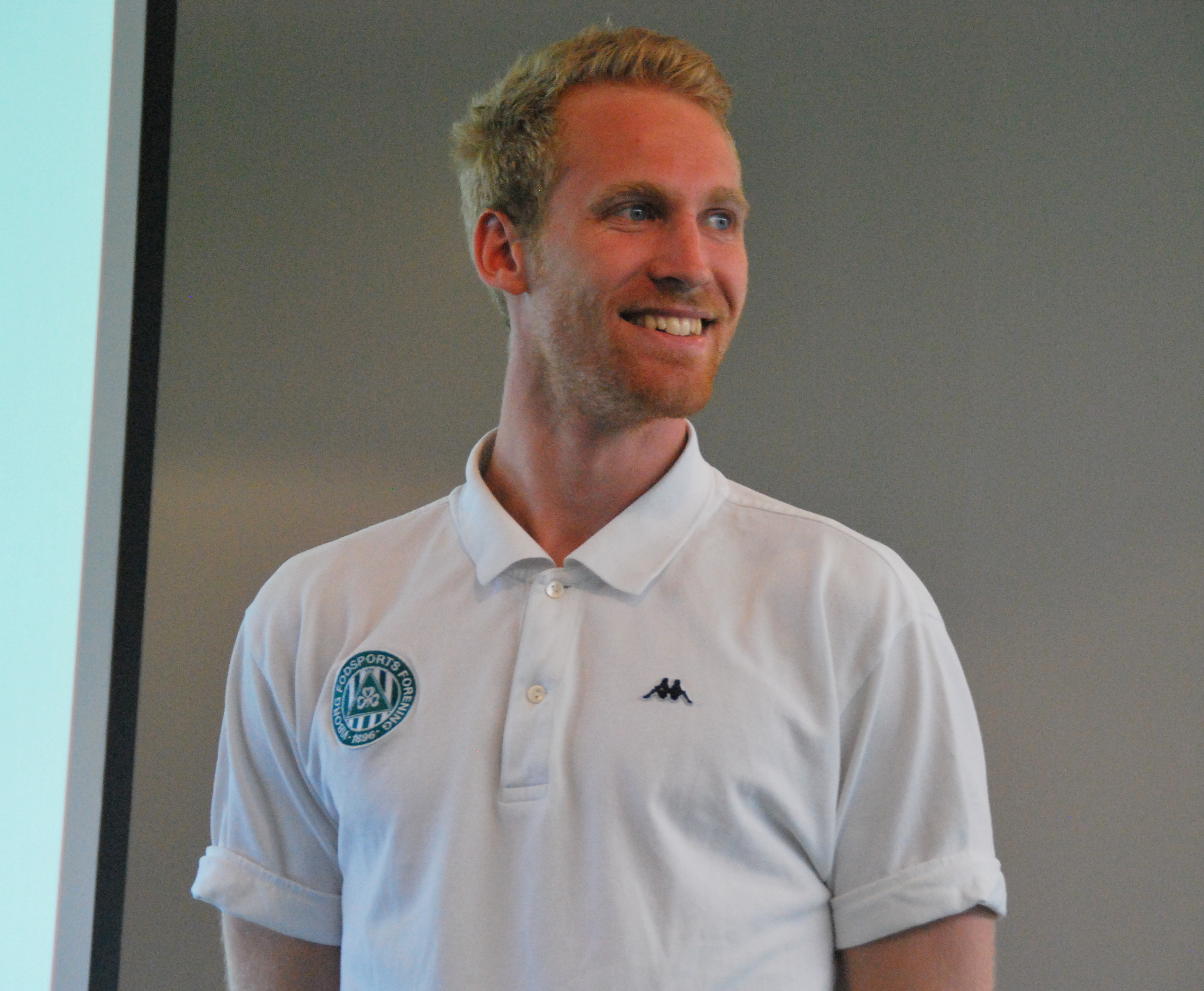 Fodboldspilleren Jonas Thorsen fra Viborg FF. Her ved præsentation af spillertruppen for foråret 2012.